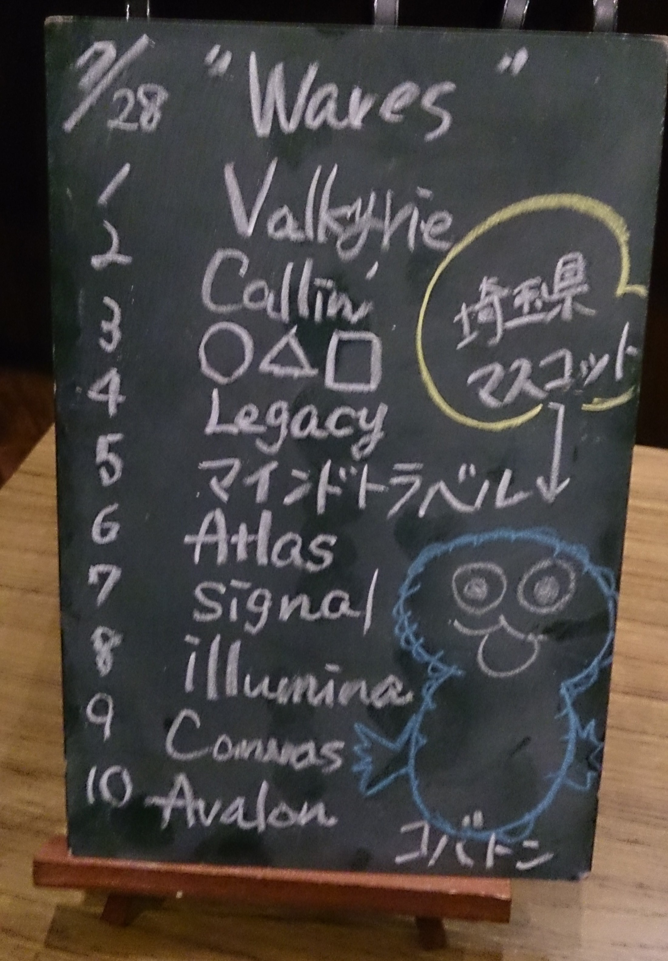 amiinAセトリボード(20170728(1))